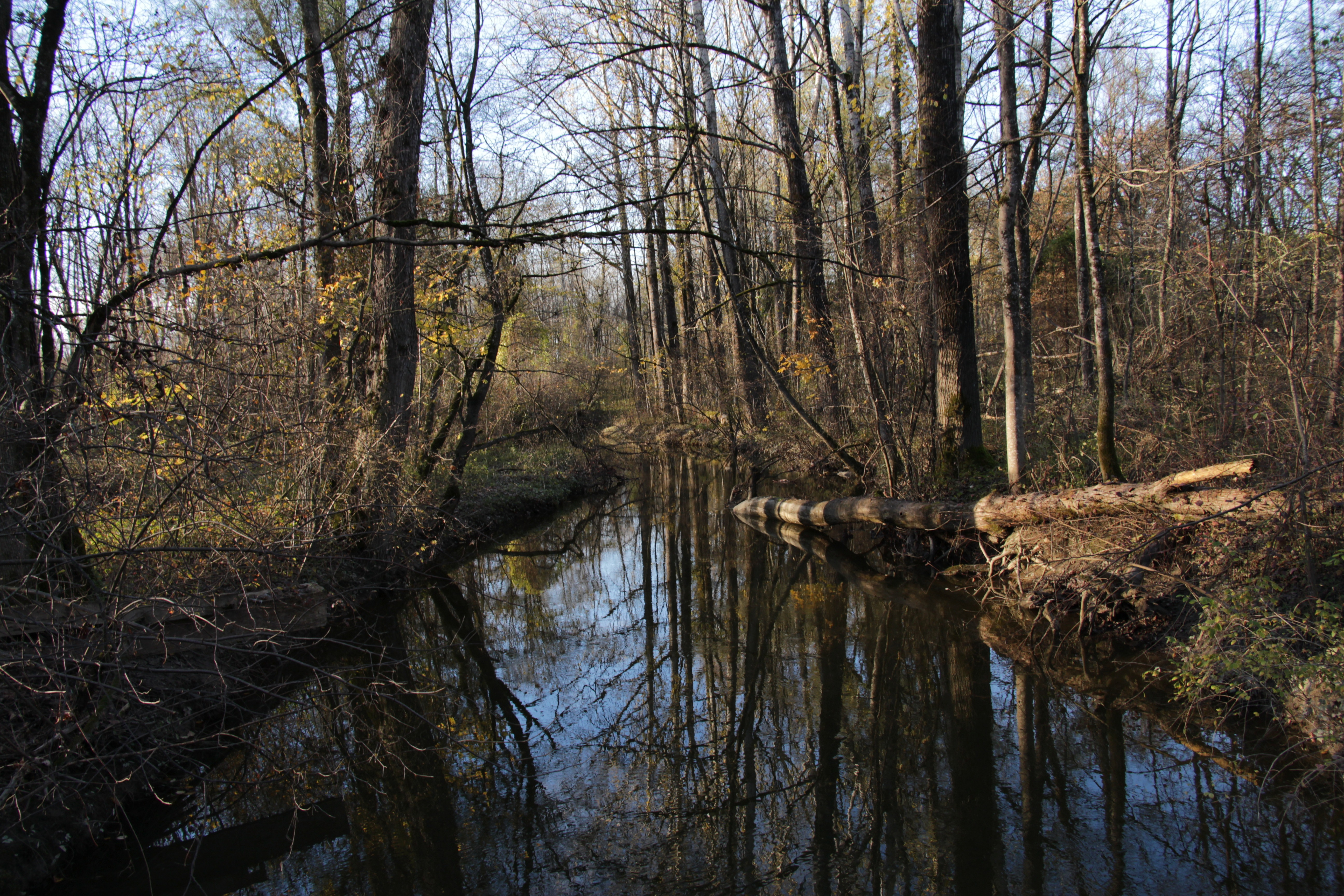 Der Reitbach in der Salzachau auf dem Gemeindegebiet von Nußdorf am Haunsberg (KG Weitwörth).